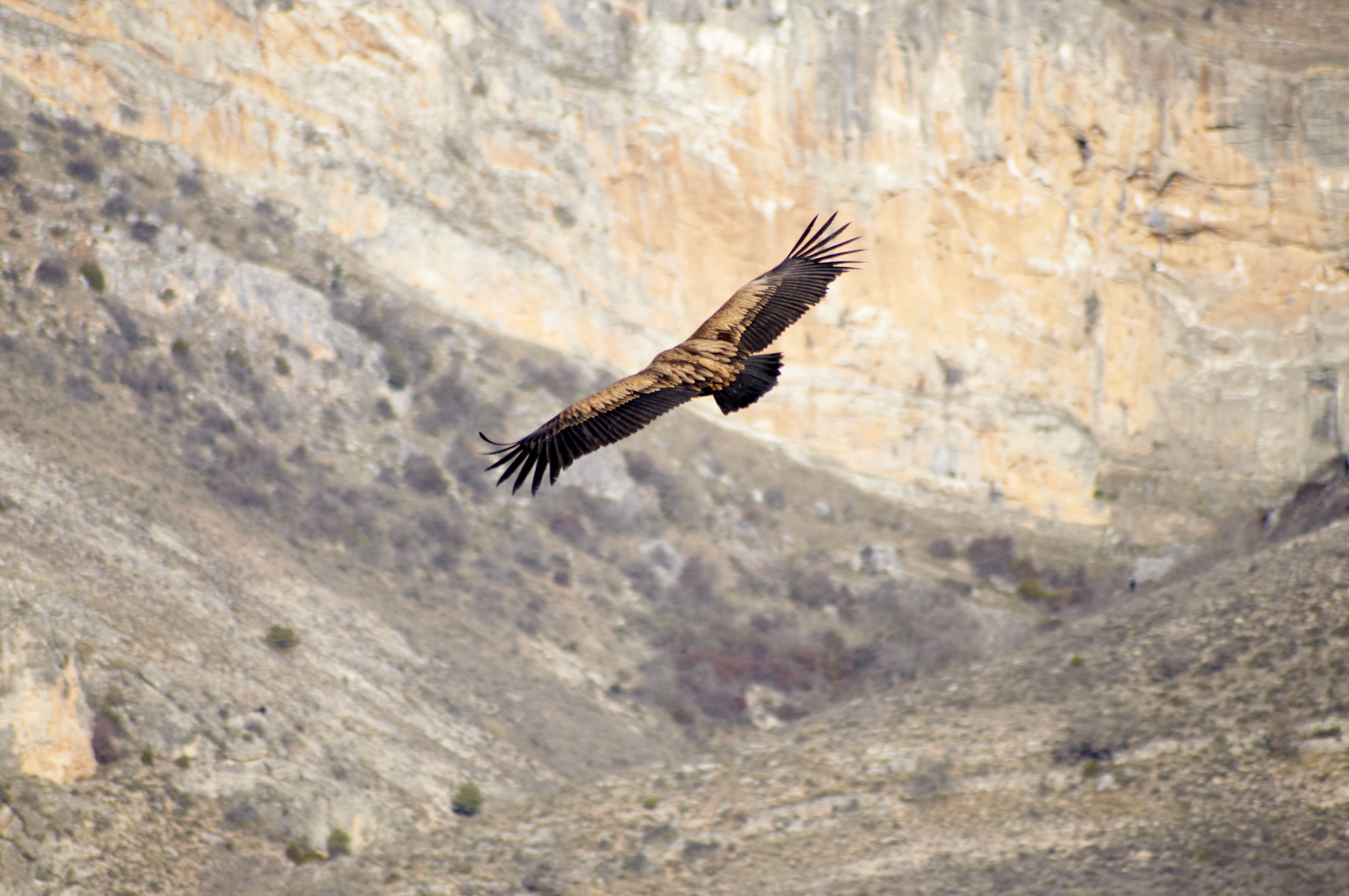 Buitre